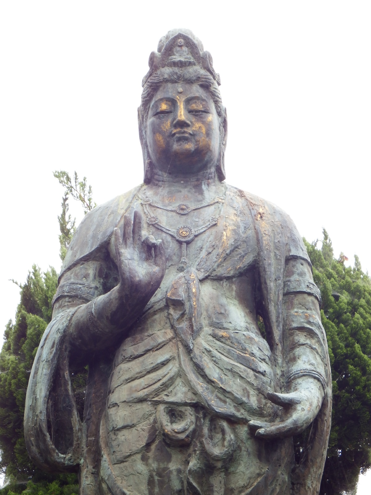 妙音寺の観音像